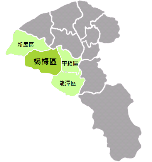 楊梅區位置圖